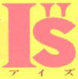 Logo del manga I"s di Masakazu Katsura, edizione Jump Comics